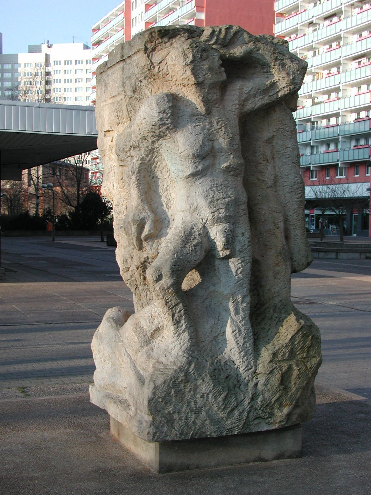 Skulptur "Der Entfesselte" (Anton-Saefkow-Ehrung) von Siegfried Krepp am Fennpfuhlpark